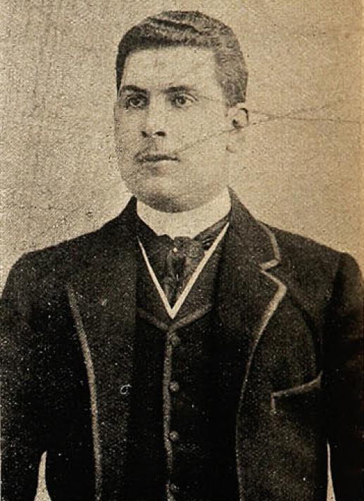 Cornelio Saavedra Montt en 1907 como Alcalde de Santiago de Chile. Cornelio Saavedra Montt (Valparaíso, el 10 de mayo de 1884 - Santiago, el 24 de marzo de 1946) fue un político chileno.